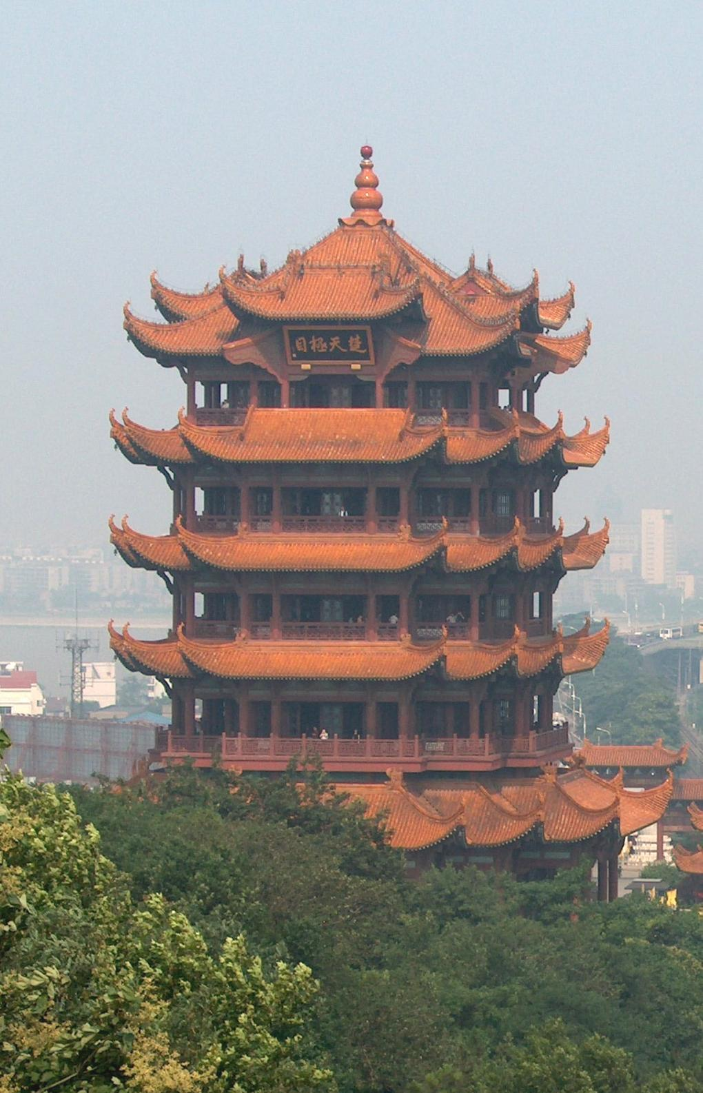 Gelber-Kranich-Pavillon in Wuhan Aufnahmedatum: Mai 2004